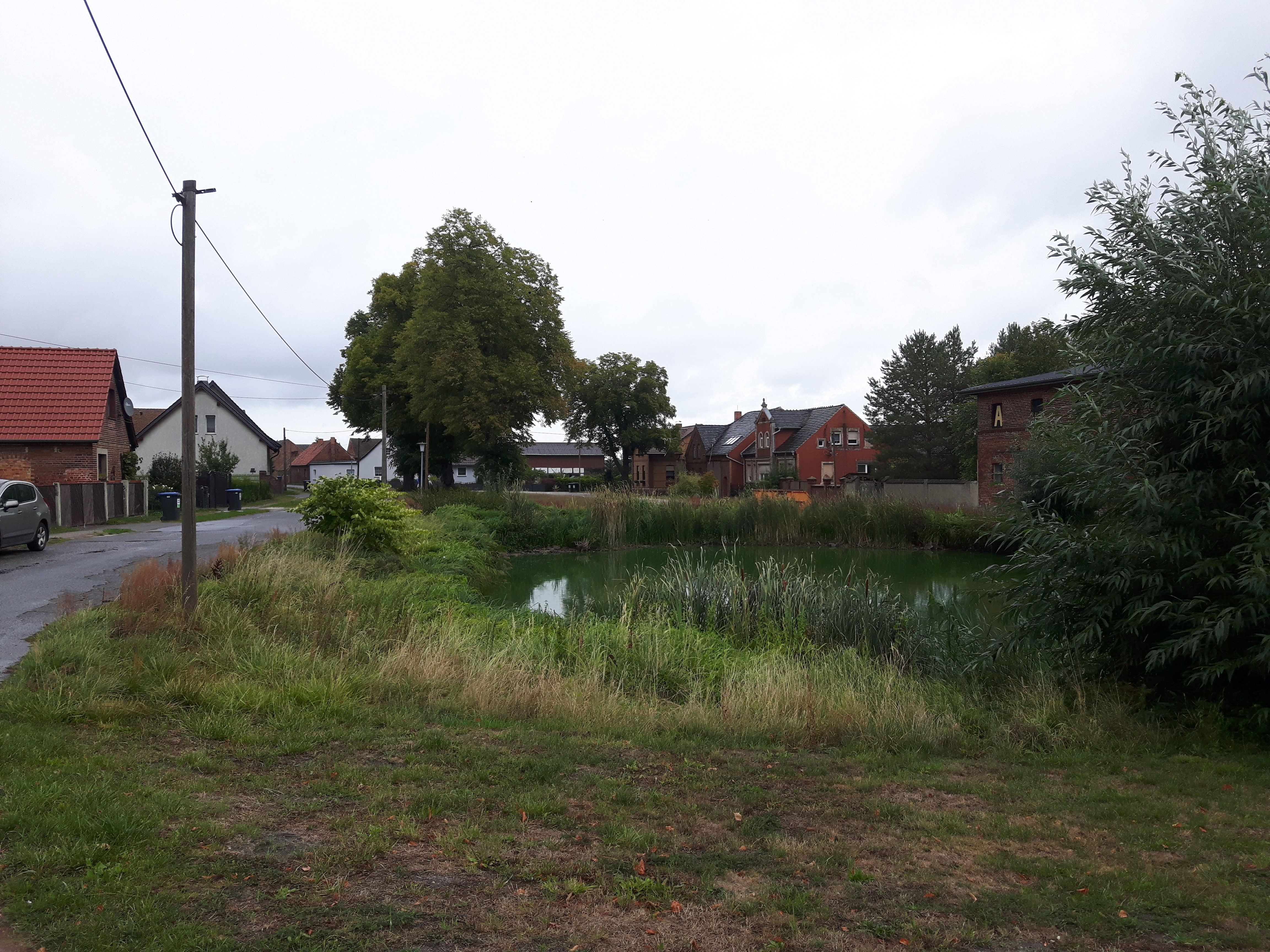 Dorfteich im Ortszentrum von Reuden, einem zu Saßleben gehörenden Dorf der Stadt Calau im Landkreis Oberspreewald-Lausitz in Brandenburg.